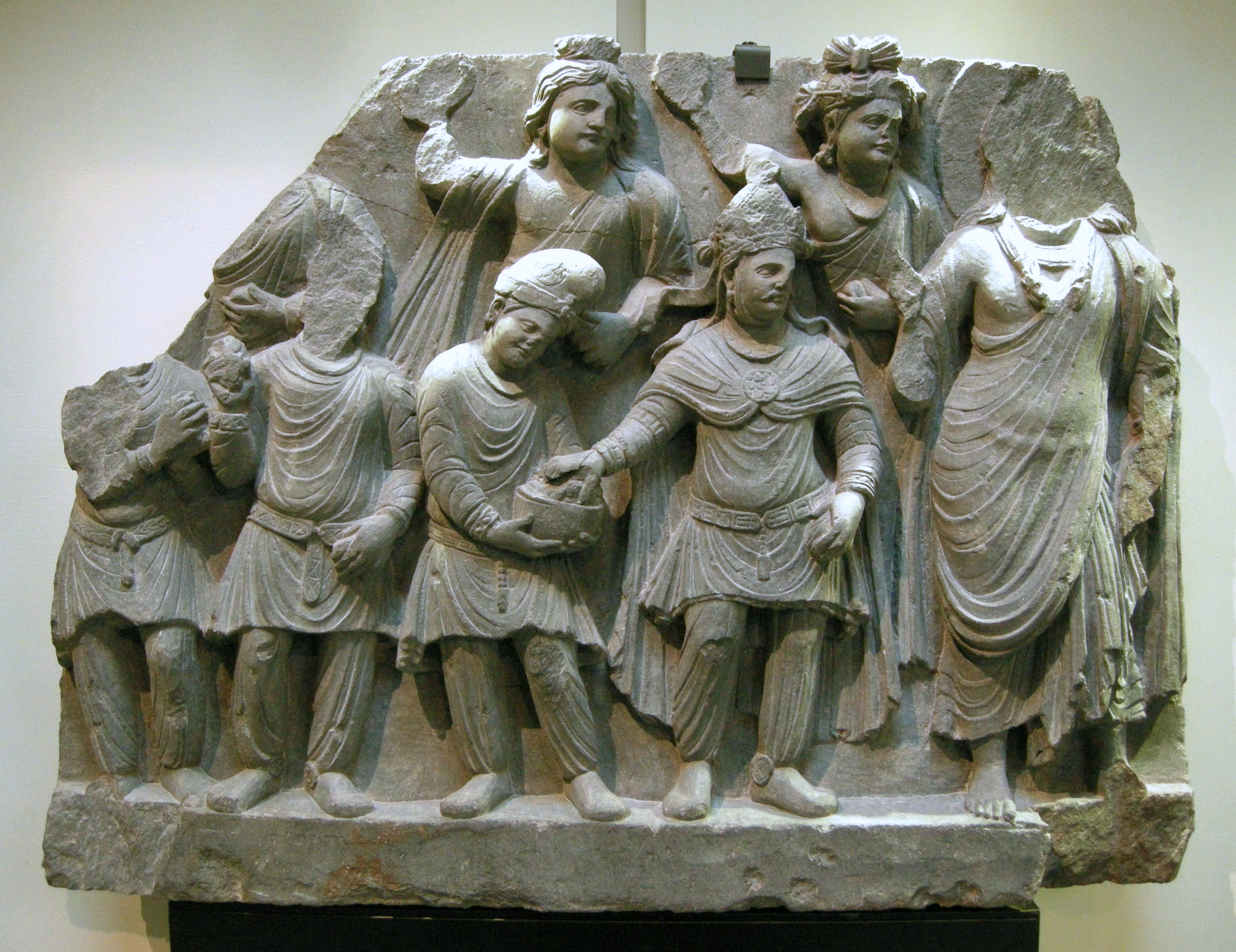 Gandhara, omaggio di un re kushana al bodhisattva, II-III sec